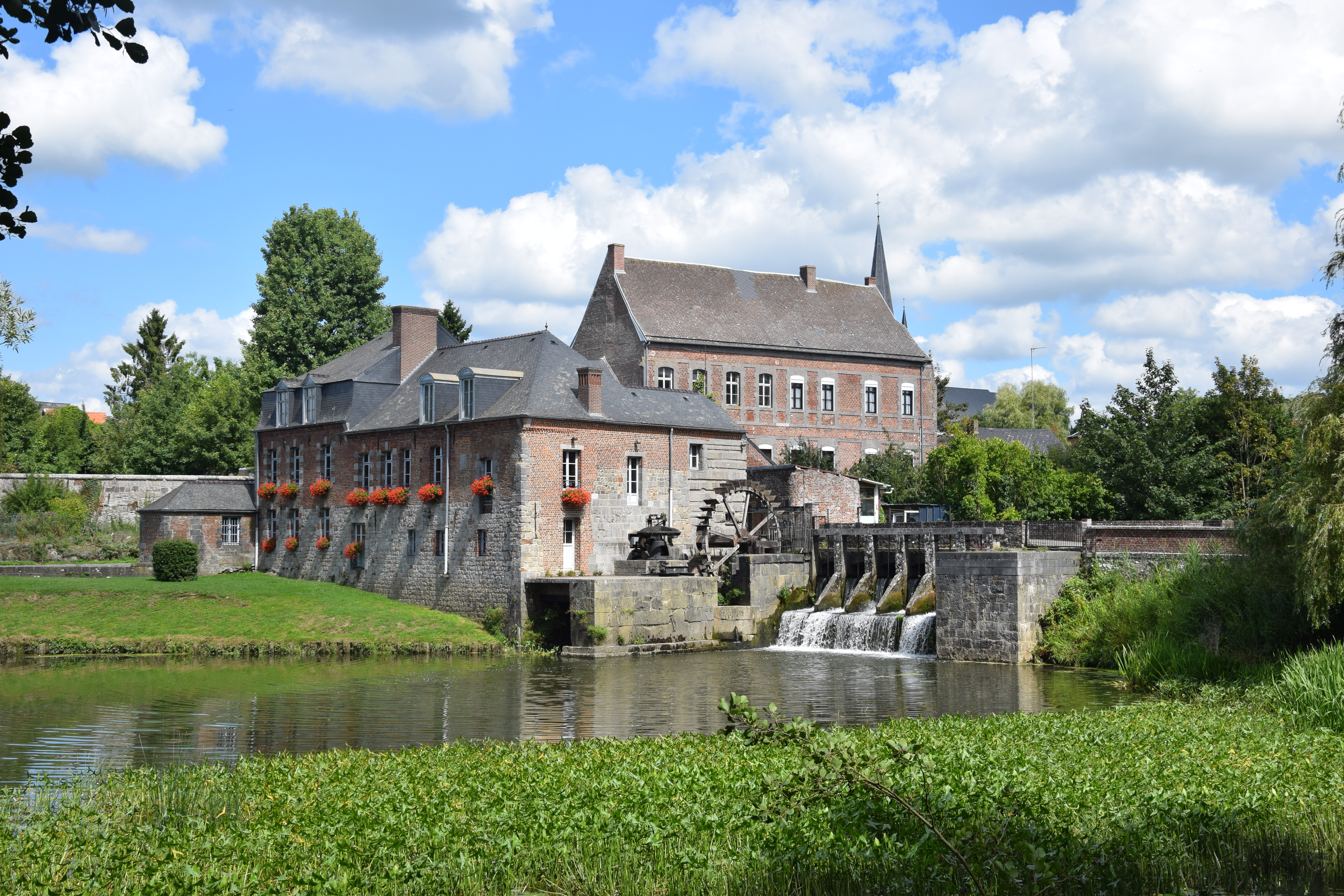 Moulin de l'Abbaye de Maroilles